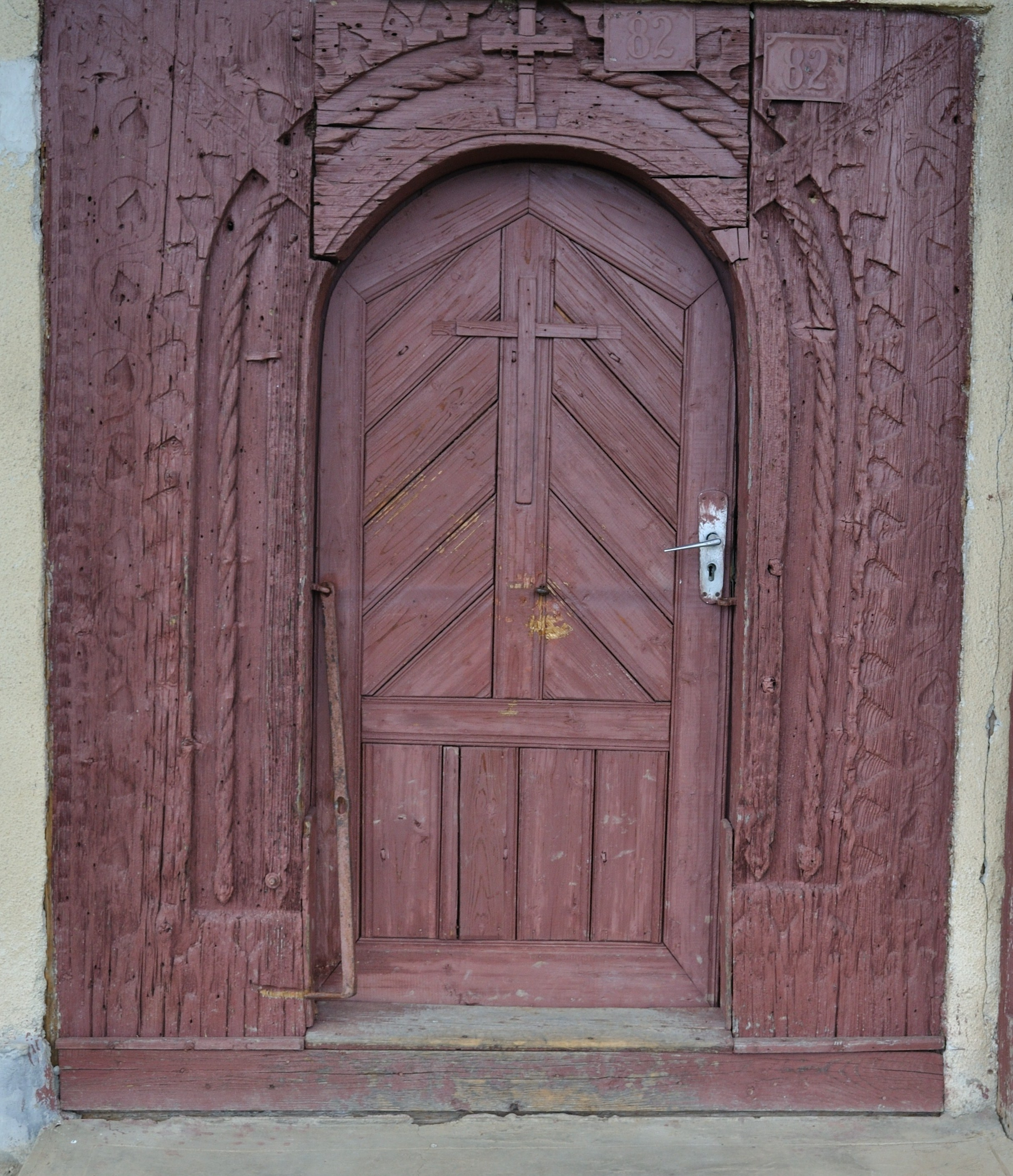 Biserica de lemn „Sfântul Nicolae” din Bădeni, județul Cluj